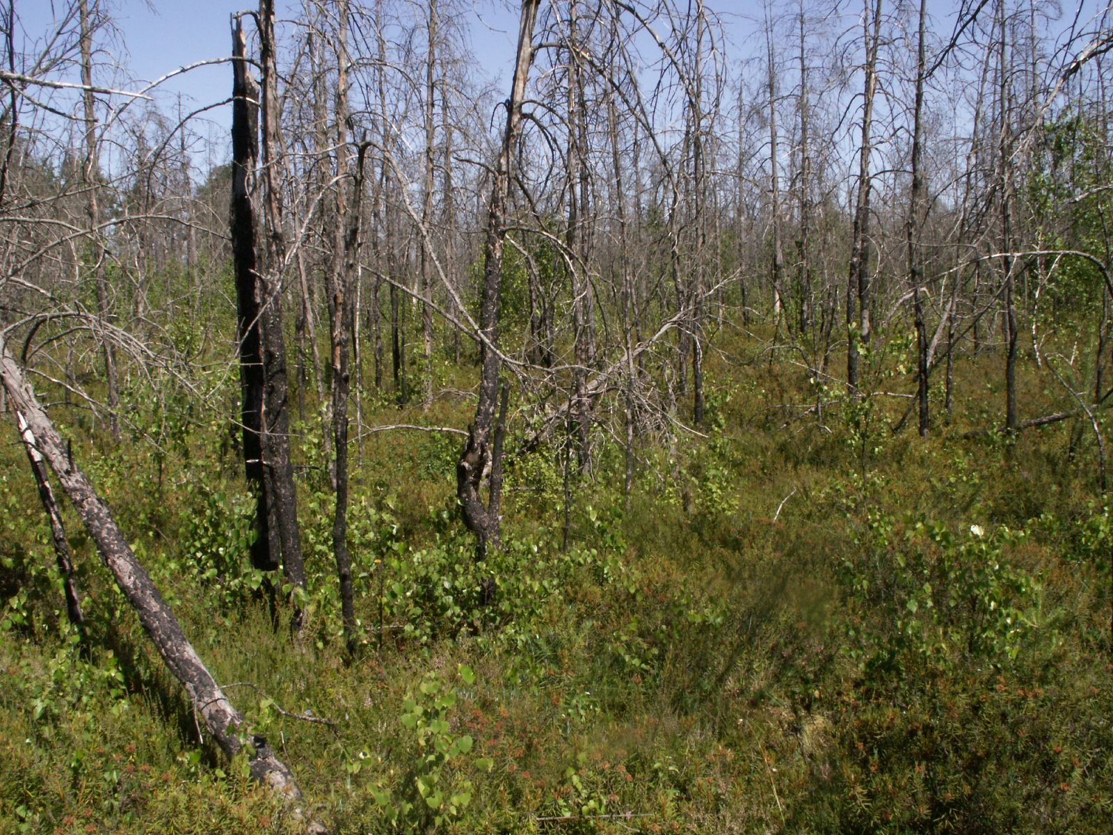 Moorbirke als Pioniergehölz, etwa 8 Jahre nach einem Brand in Ledo-Pinion